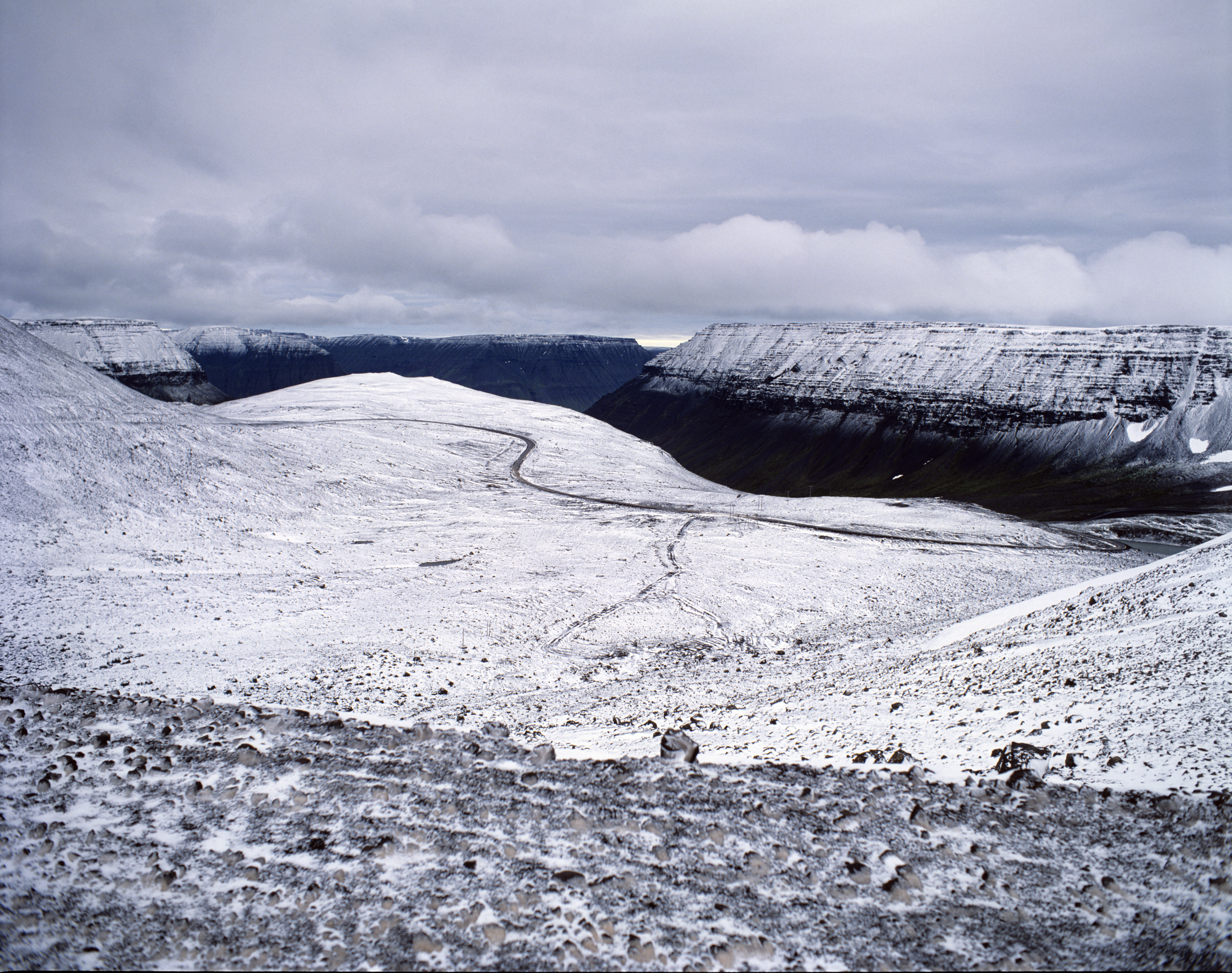 Breiðadalsheidi in Richtung Ömundarfjörður.